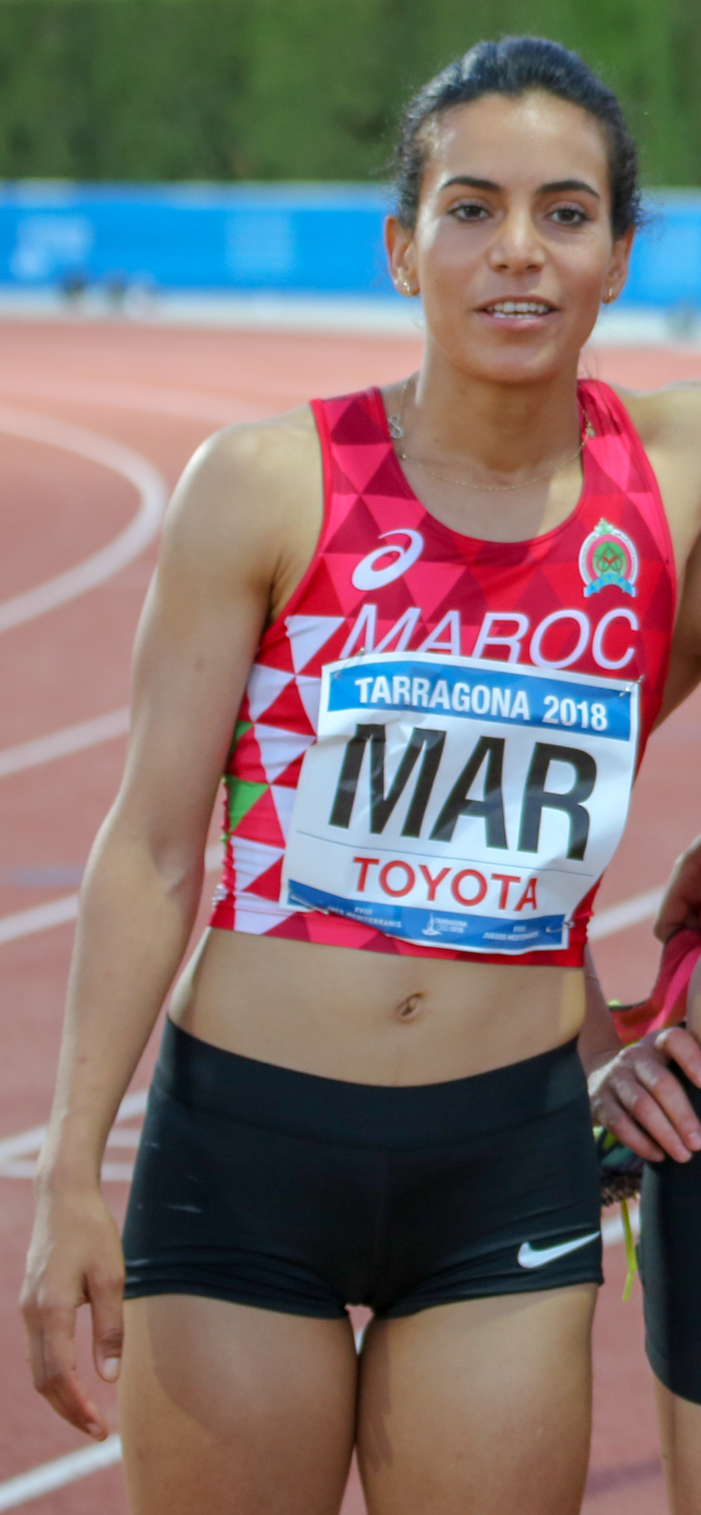 Marruecos en los relevos 4x400 en los Juegos del Mediterráneo 2018 (Assia Raziki, Malika Akkaoui, Khadija Ouardi, Rababe Arafi)